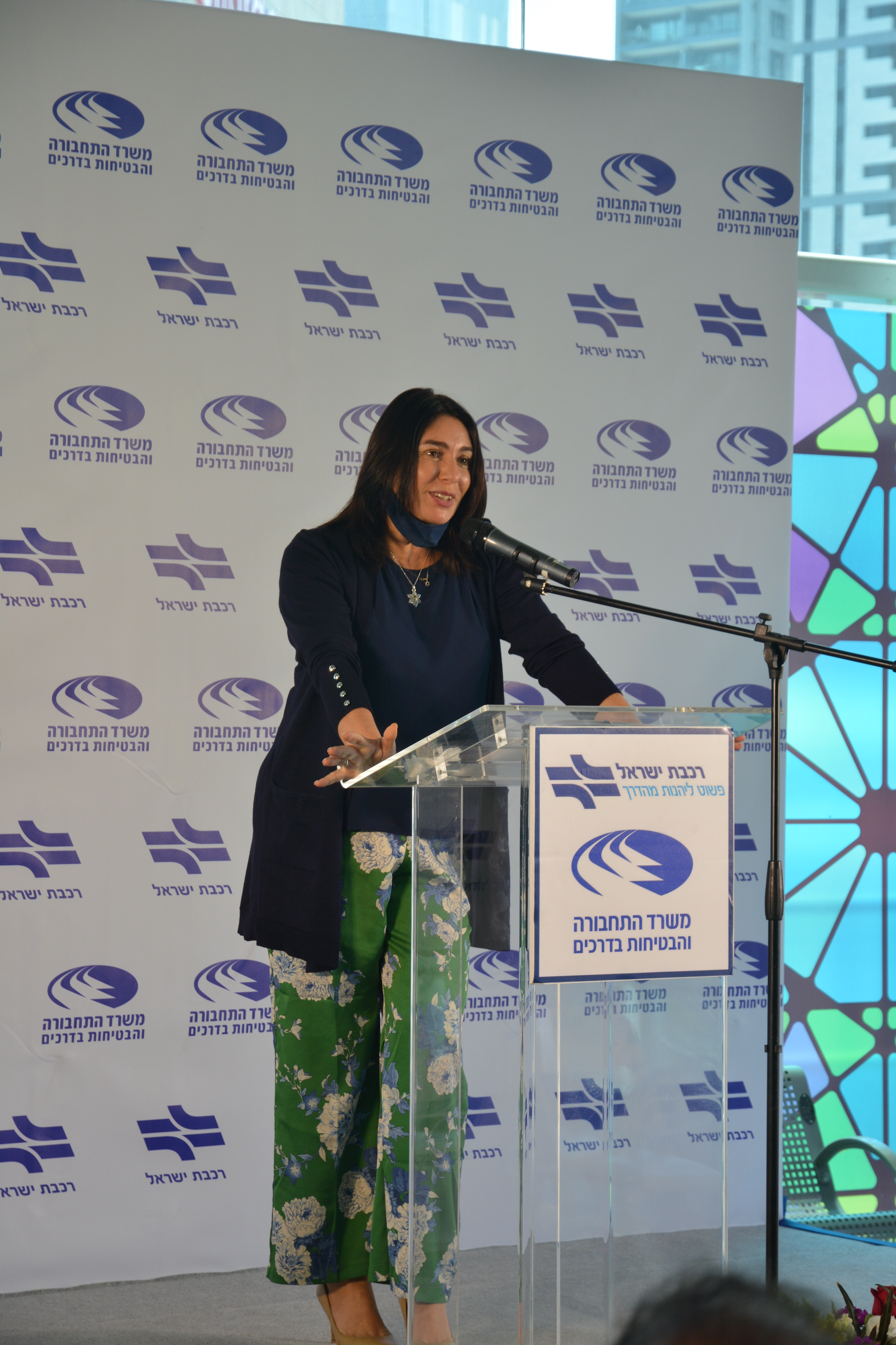 שרת התחבורה נואמת באירוע הגעת קו הרכבת החשמלי מירושלים לתחנת הרכבת תל אביב מרכז סבידור